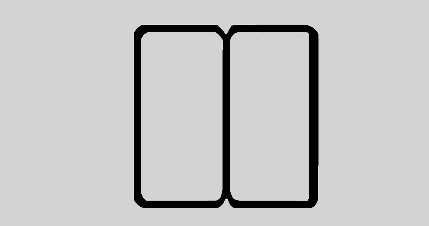 Typologie der podomorphen Petrosomatoglyphen auf Lanzarote nach Hans-Joachim Ulbrich